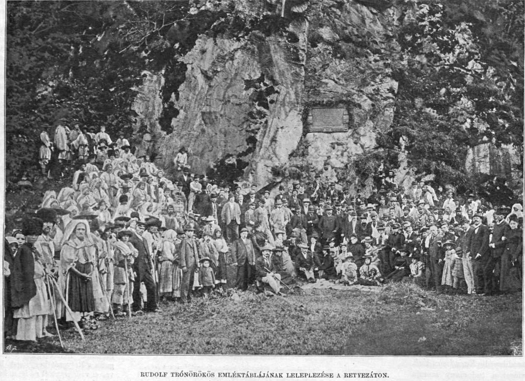 Retyezáti avató (Rudolf-emléktábla)